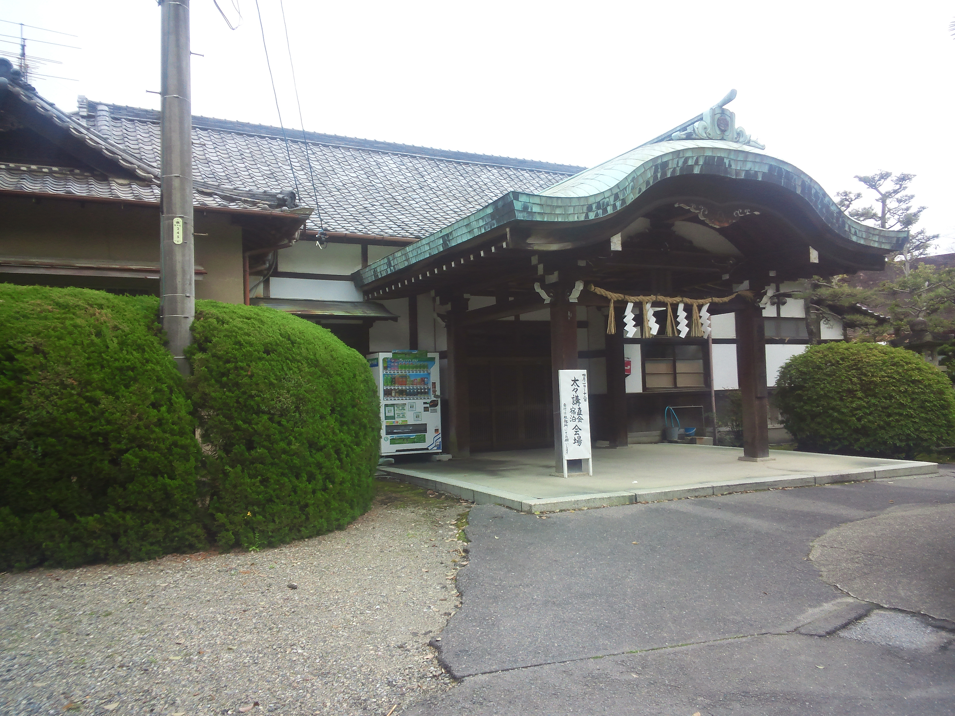 津島神社 - 参集殿